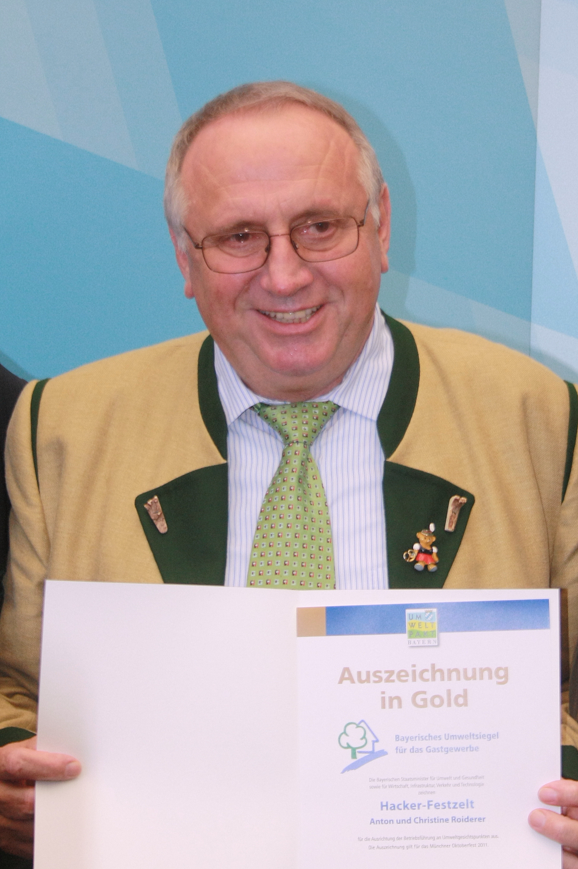 Anton ("Toni") Roiderer, Wirt des Hacker-Zeltes auf dem Münchner Oktoberfest und Sprecher der Wiesnwirte. Hier am 26. September 2011 nach Erhalt des Bayerischen Umweltsiegels für das Gastgewerbe im Hacker-Zelt.